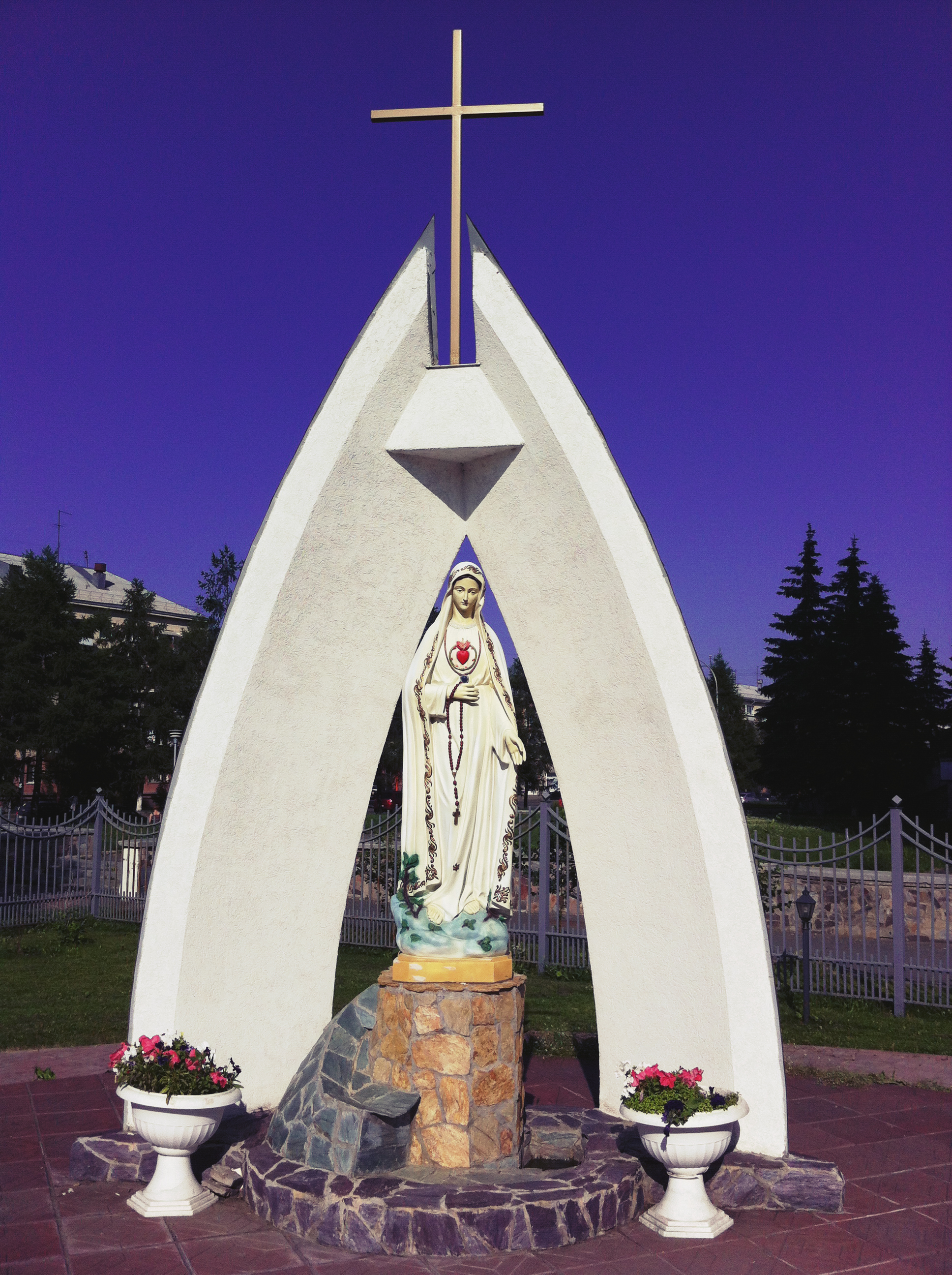 Статуя Девы Марии на территории Католического храма в Кемерово